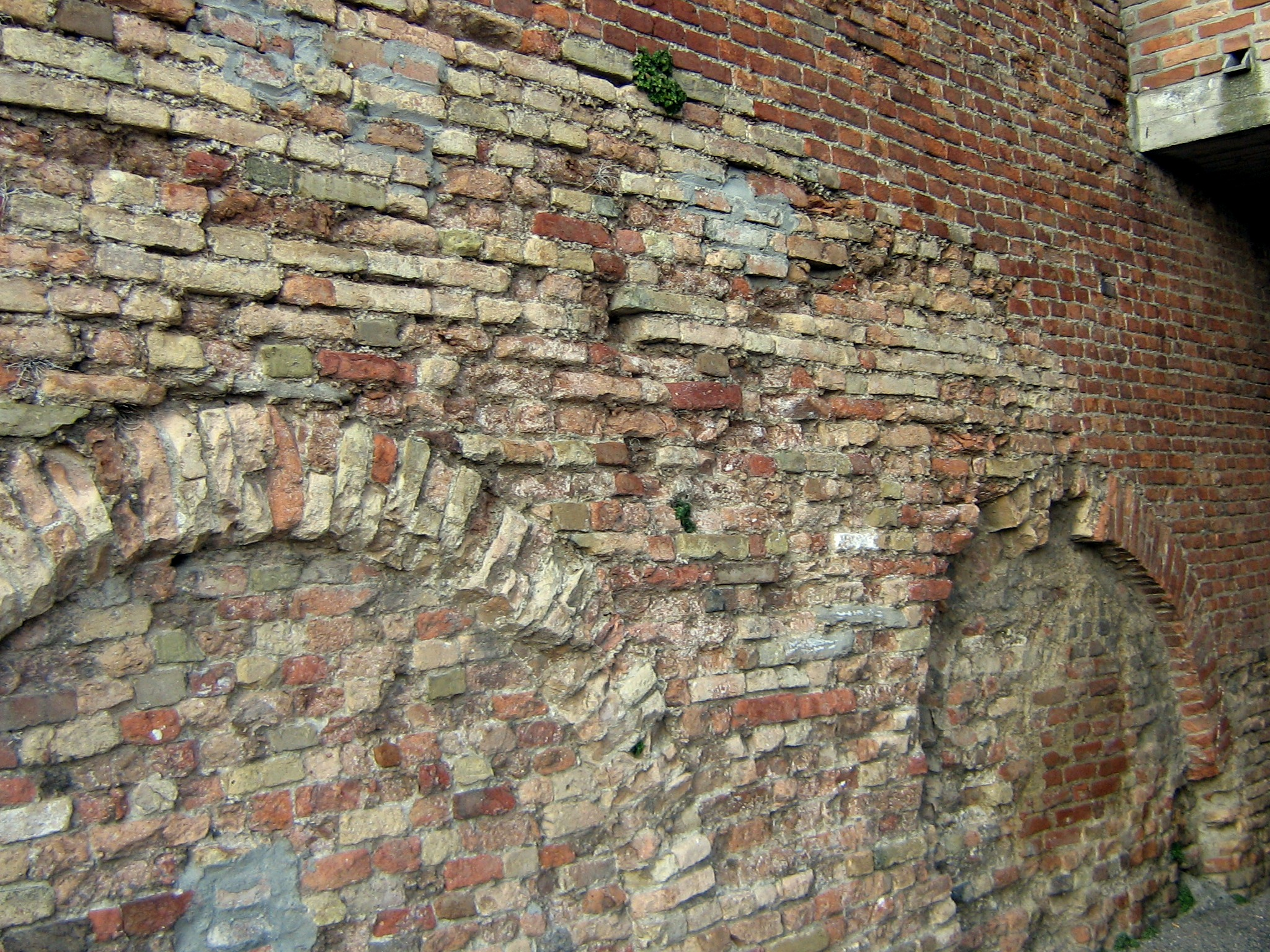 L'inizio di via San Giuseppe, Fontanile